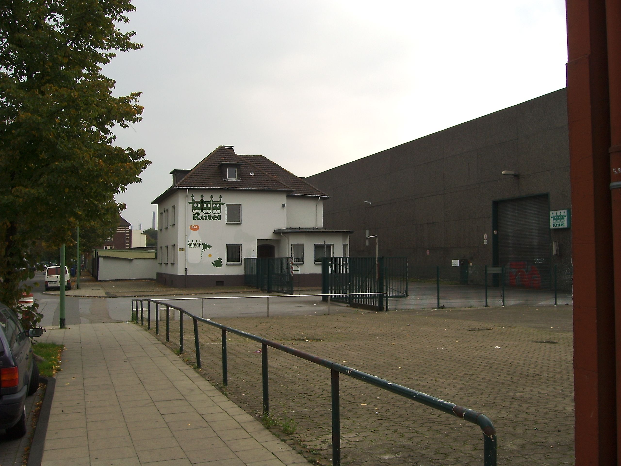 Kutel-Haus, Milchhof Essen, Essen-Altenessen